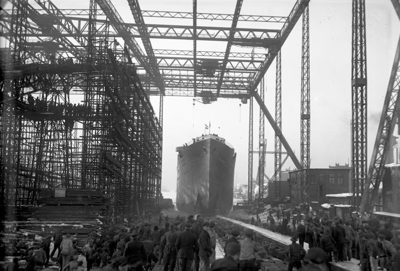 Der feierliche Stapellauf des grössten deutschen "Hapag"-Motorschiffes "Milwaukee" 17 tausend Tonnen auf der Werft Blohm & Voss in Hamburg Das grösste deutsche Motorschiff "Milwaukee" während des Stapellaufs auf der Werft Blohm & Voss in Hamburg.